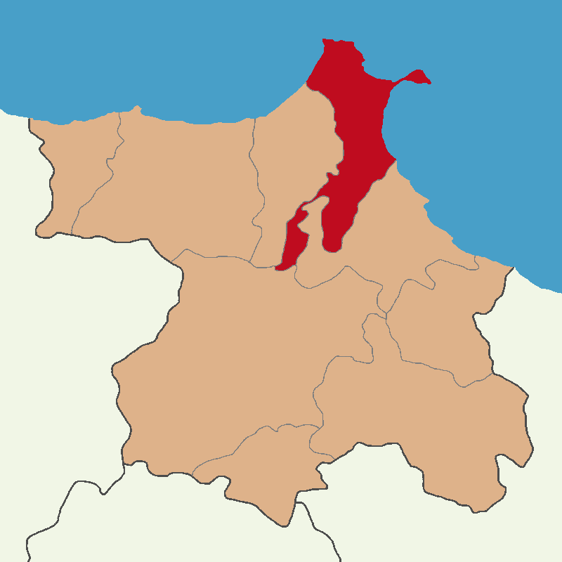 Sinop Merkez ilçesinin konumu